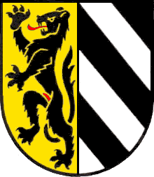 Wappen der politischen Gemeinde Diegten, Schweiz